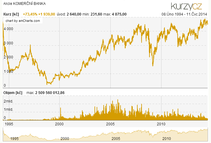 Akcie KOMERČNÍ BANKA - Graf vývoje kurzu na Burze Praha.